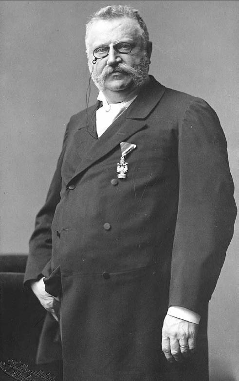 Dr. Elischer Gyula a Vaskoronarend kitüntetéssel